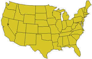 Karte der USA, Reno (Nevada) hervorgehoben, public domain nach der Vorlage Bild:USA Bundesstaaten.png